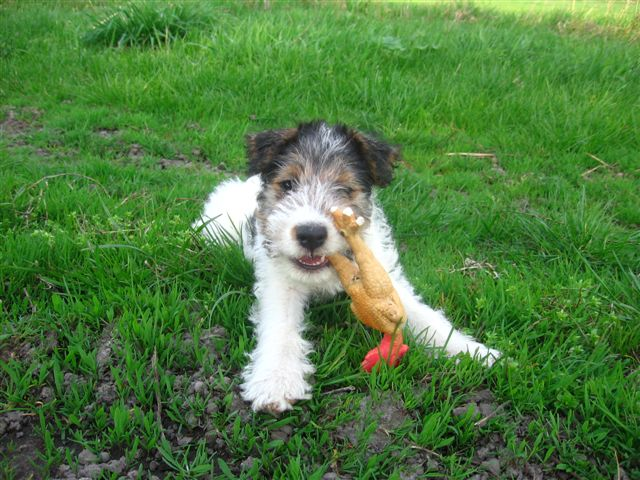 Fox-Terrier Wire Puppy